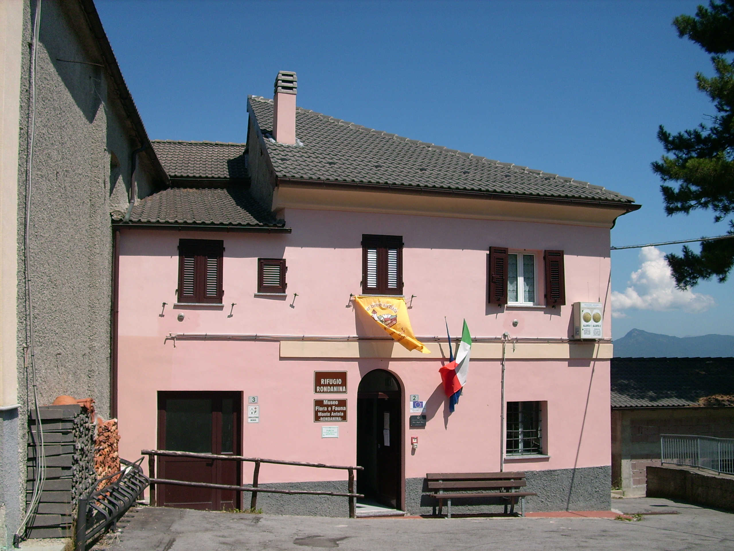 Rifugio Rondanina e Museo della Flora e della Fauna di Rondanina, Liguria, Italia